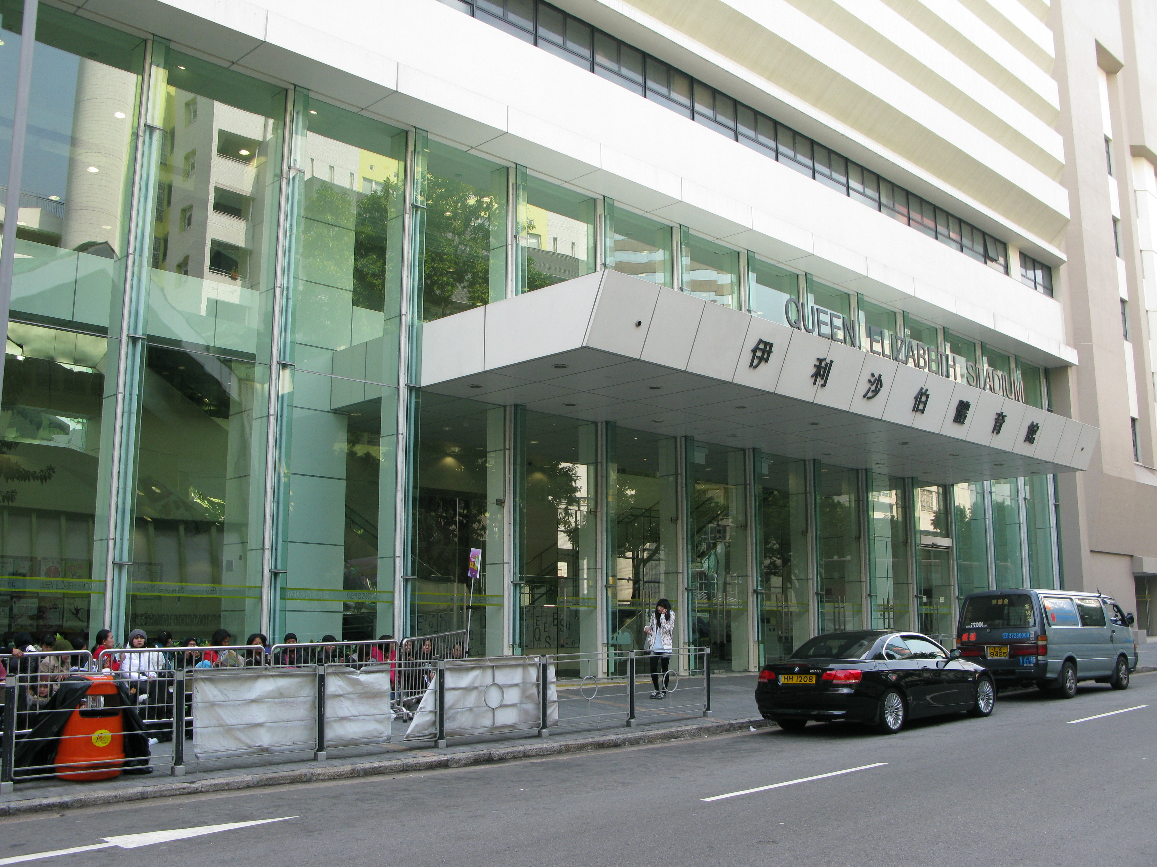 中文（香港）: 香港愛群道伊莉沙伯體育館（翻新後）